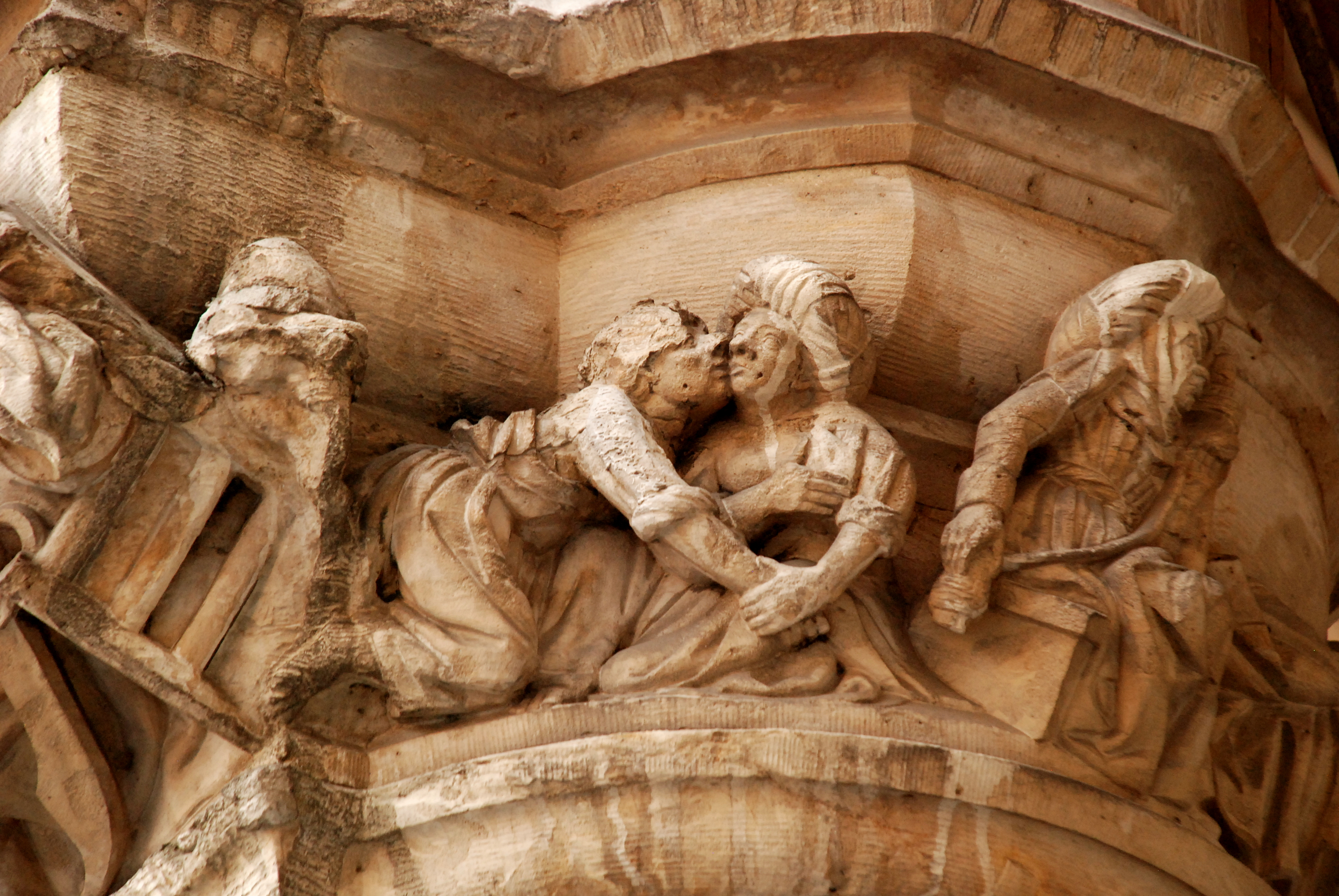 Belgique - Bruxelles - Grand-Place - Maison du Maure